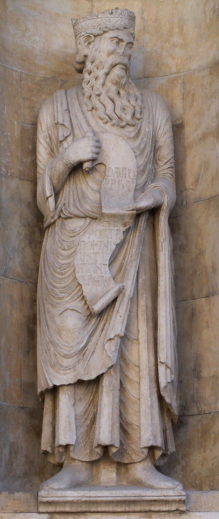 Duomo di Fidenza (provincia di Parma, Italy): statua di Re Davide, opera attribuita a Benedetto Antelami, situata nella facciata esterna della cattedrale. XII secolo.